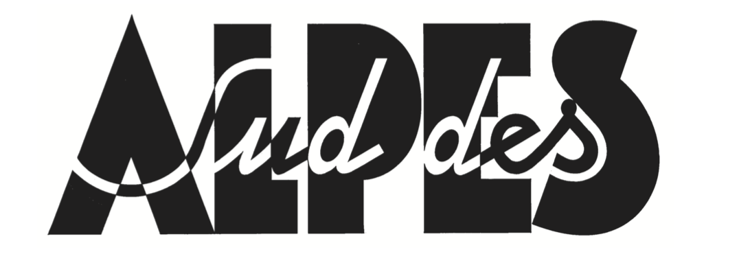 Logo du Sud des Alpes, le centre musical de l'Association pour la musique improvisée (AMR) à Genève.